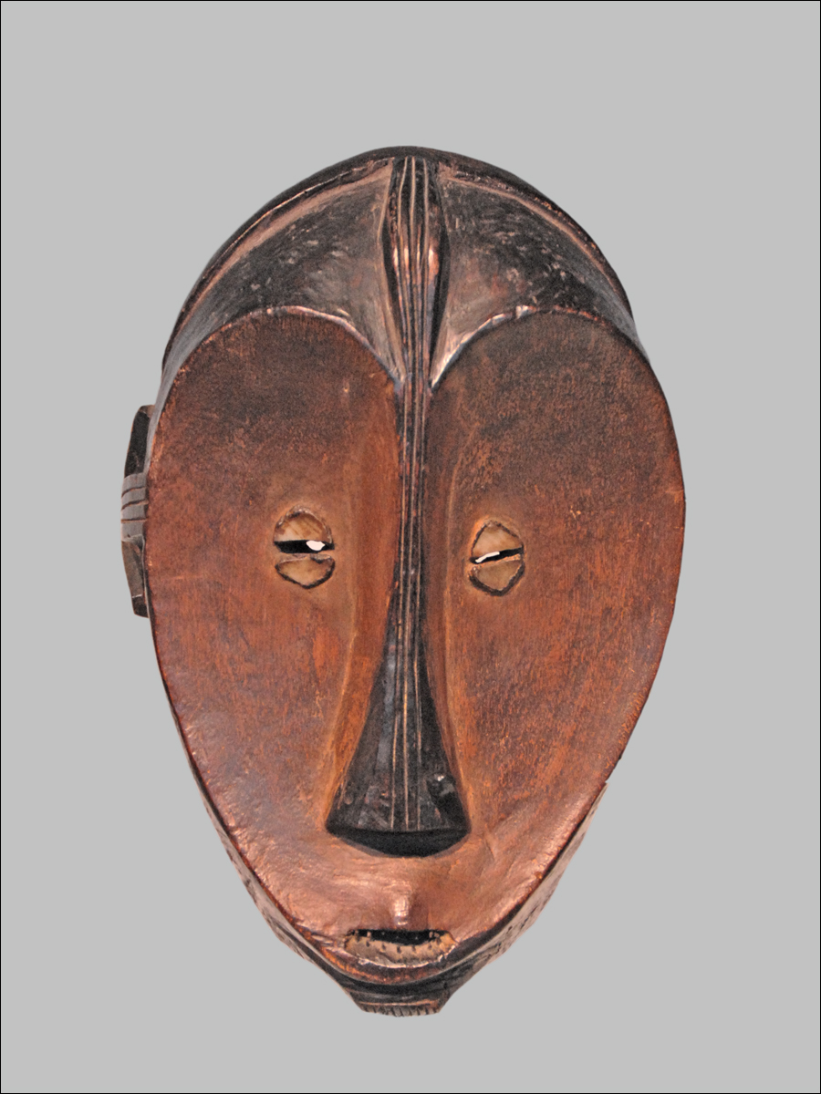 Masque facial Ngbaka République démocratique du Congo bois, pigments polychromes, cauris Collection particulière, Belgique Exposition Fleuve Congo Musée du quai Branly